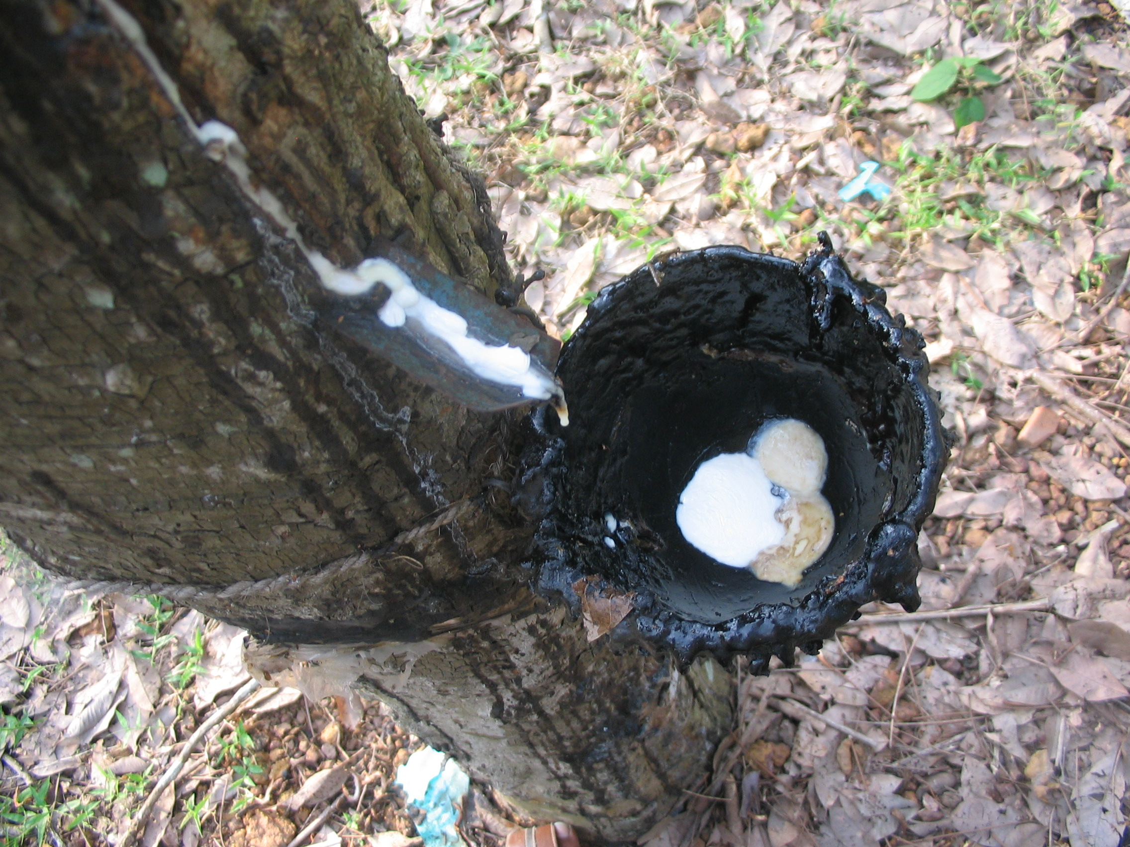 റബർപാൽശേഖരണം